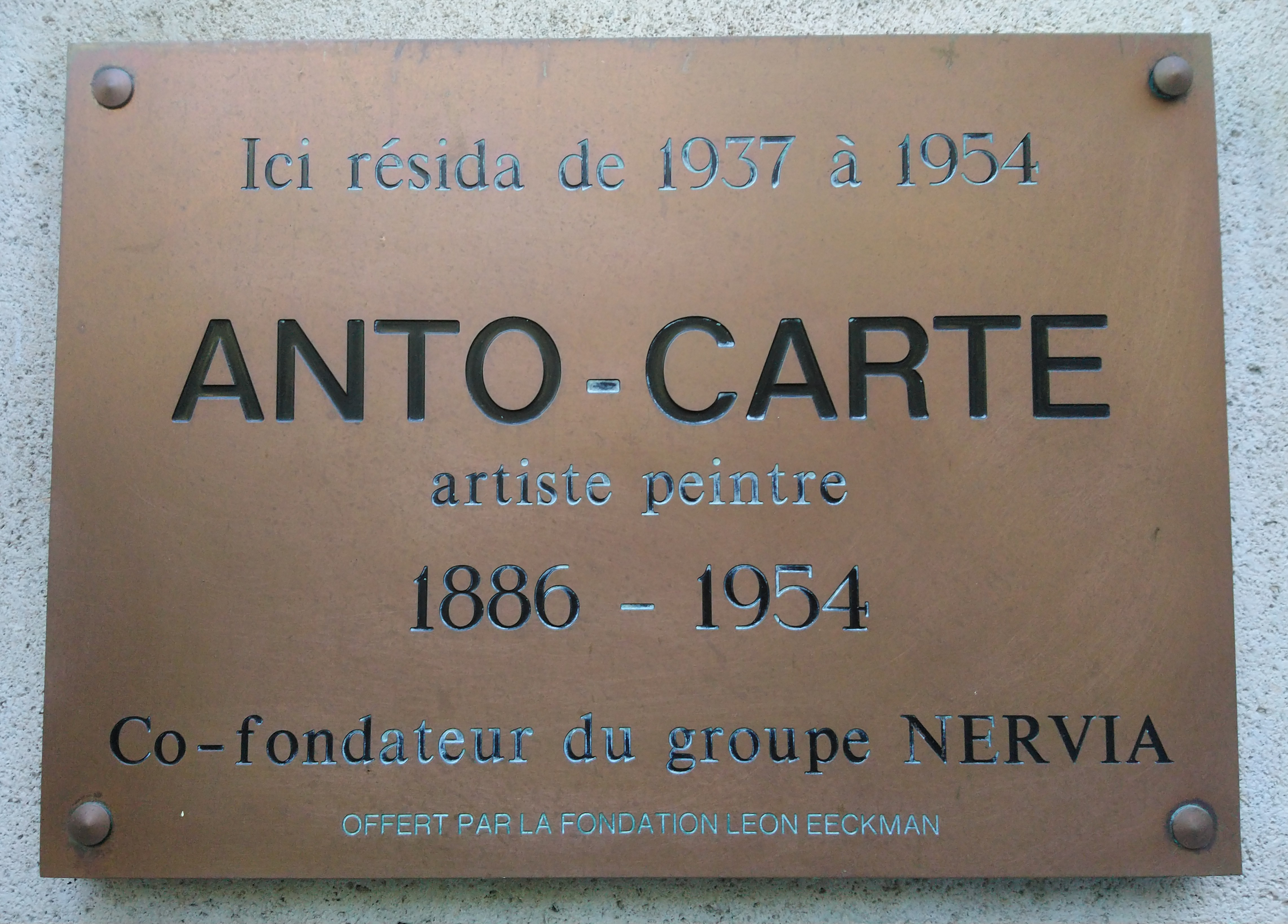 Паметна плоча на художника Антон Карте, Брюксел. 46, Rue de l'Ermitage